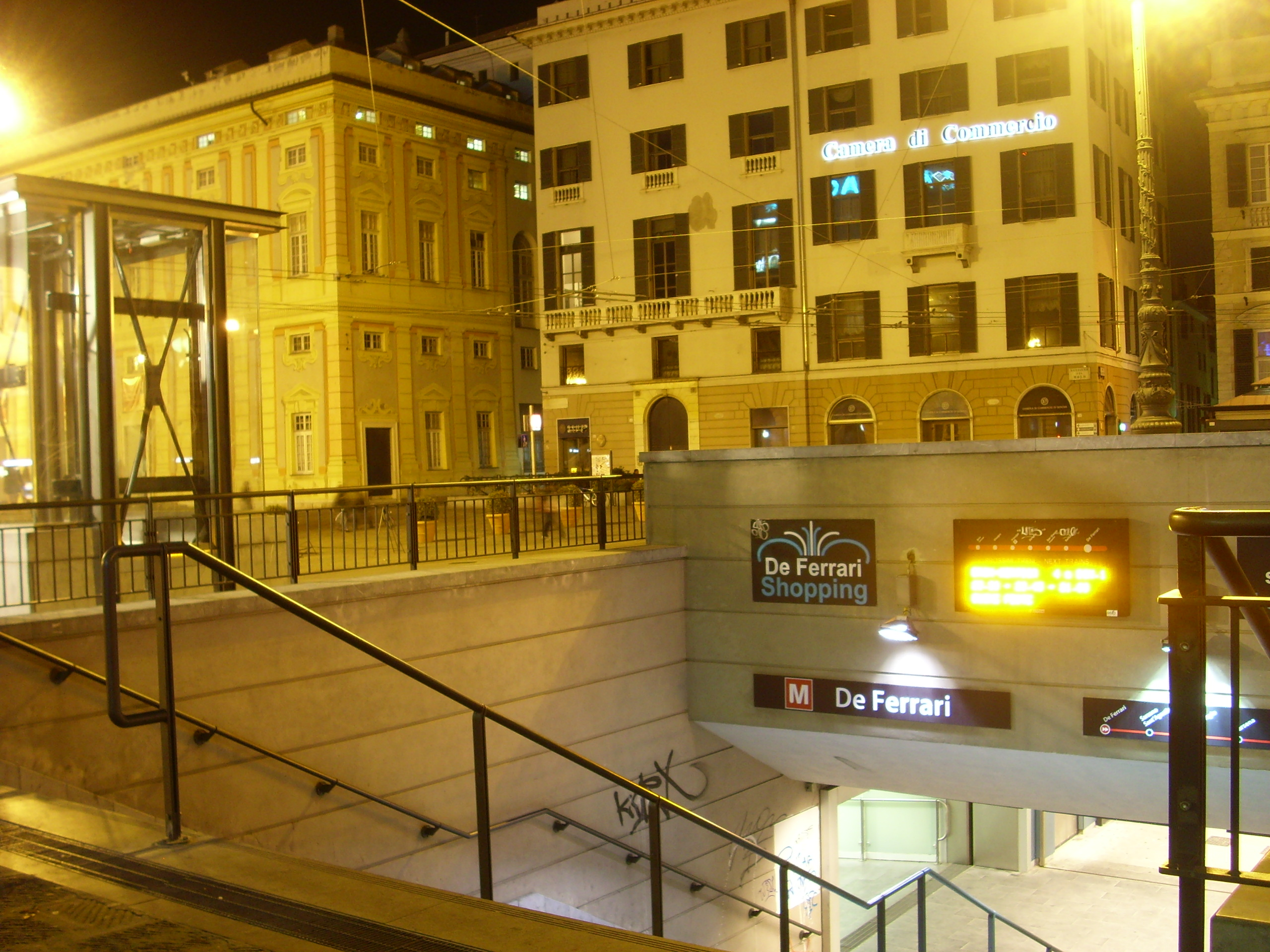 Stazione di De Ferrari della metropolitana di Genova, sita nell'omonima piazza.